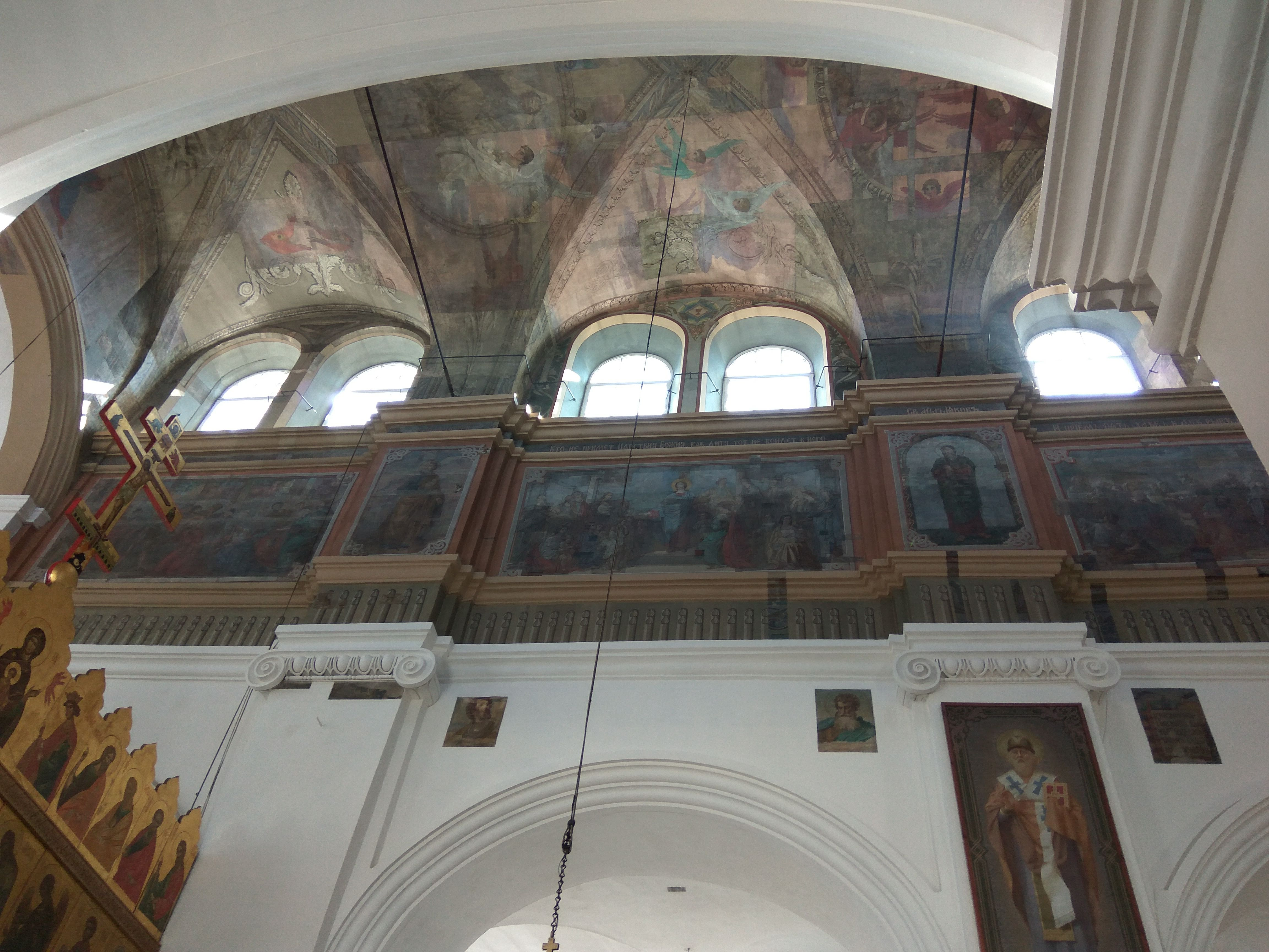 Мінск. Петрапаўлаўская ў жніўні 2018